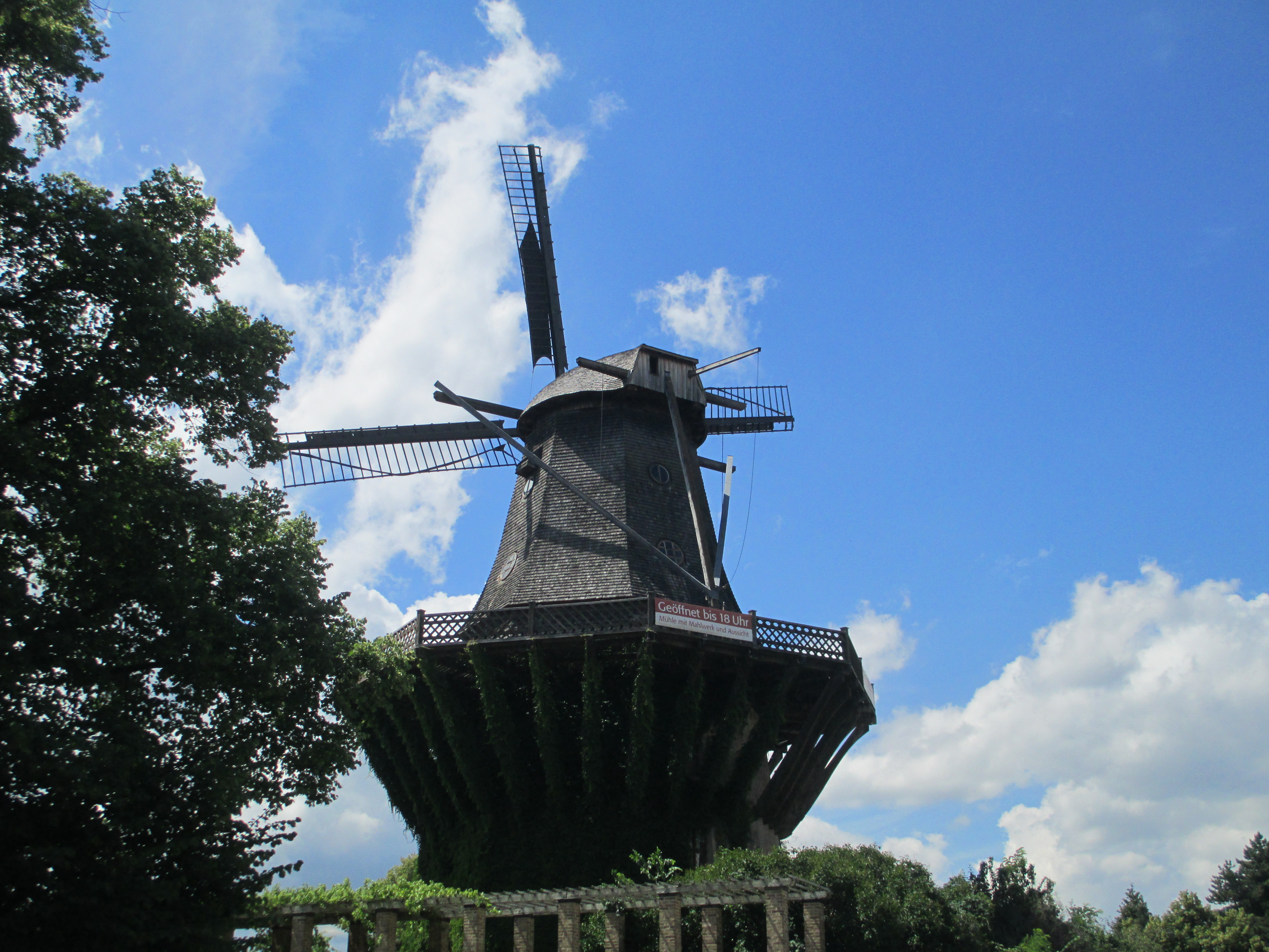 תחנת רוח בסנסוסי